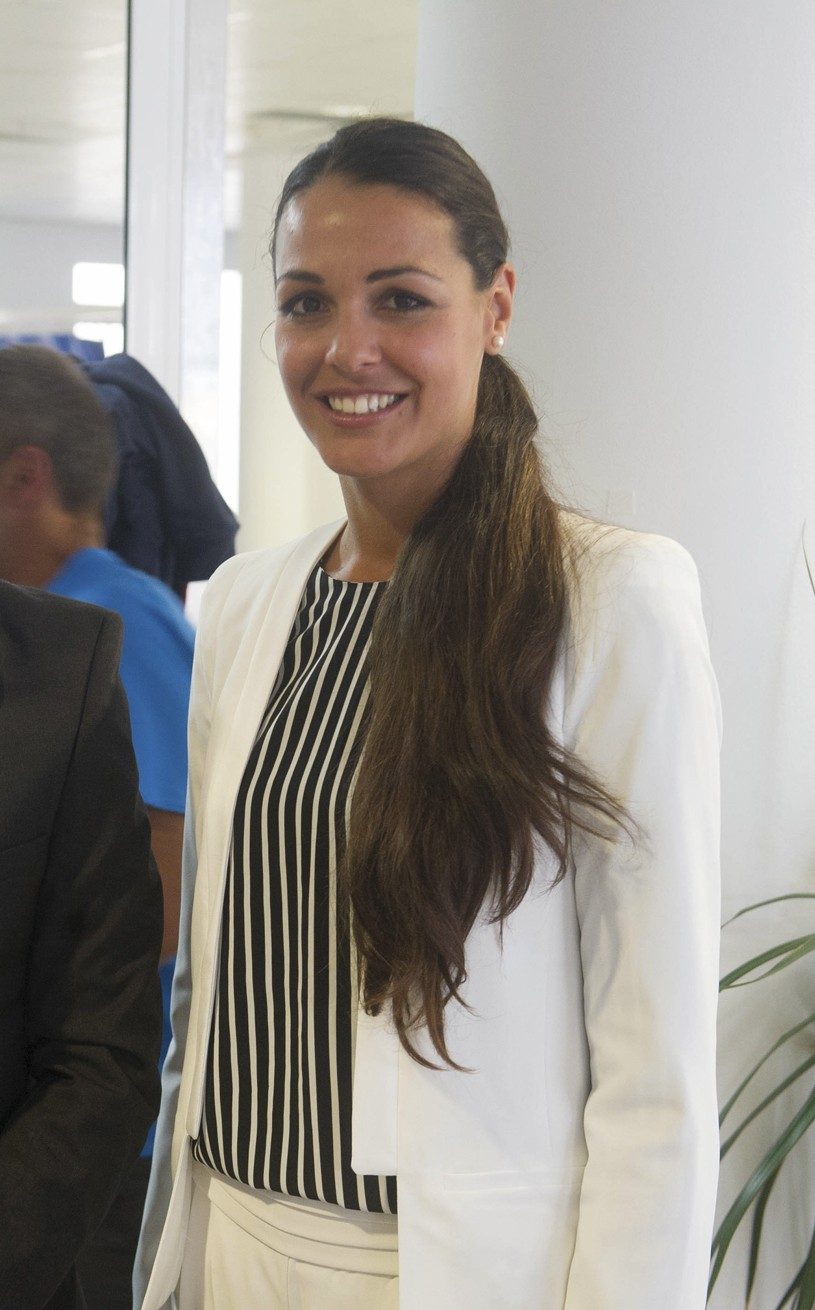 El concejal de deportes de La Línea de la Concepción, Ángel Villar, y la vicealcaldesa de Gibraltar, Kaiane Aldorino.